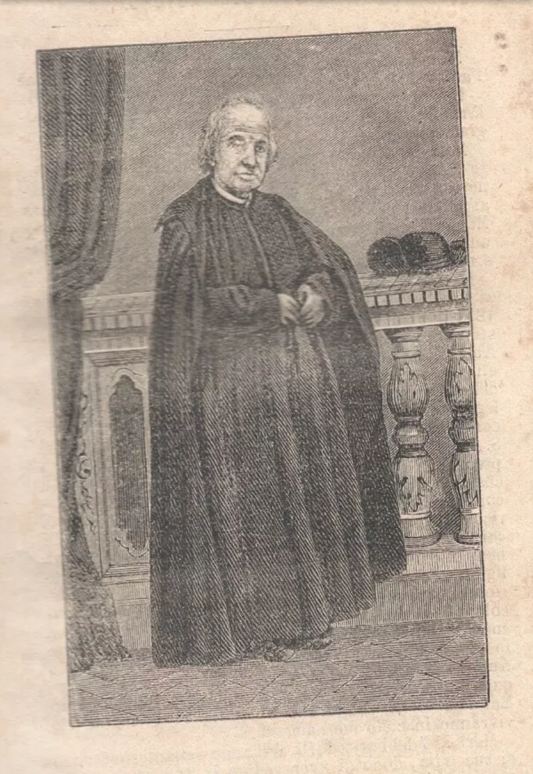 Immagine raffigurante il Sacerdote e Canonico Giuseppe Riva, autore di numerose opere a carattere spirituale, tra cui la "Filotea"